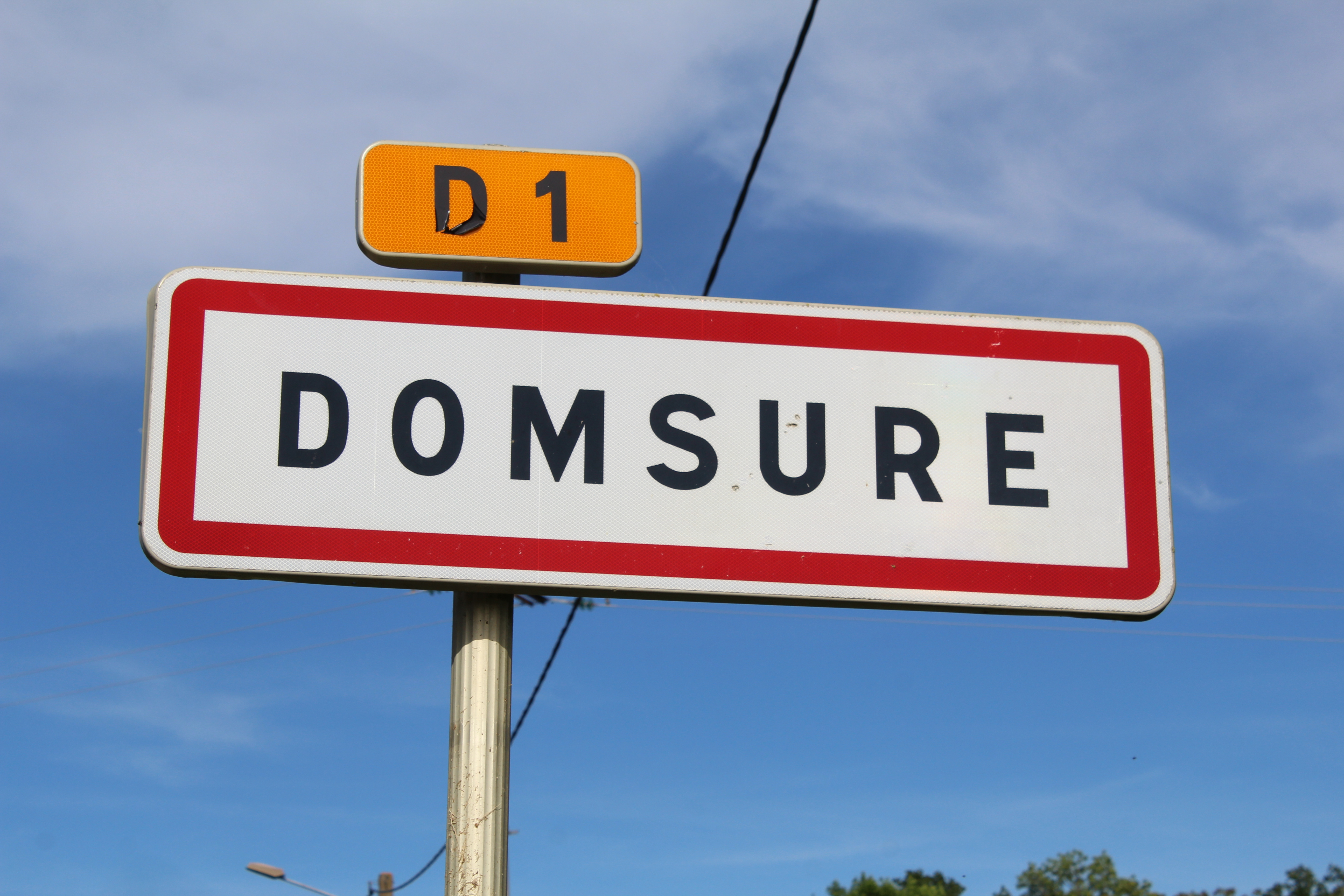 Panneau d'entrée dans Domsure.